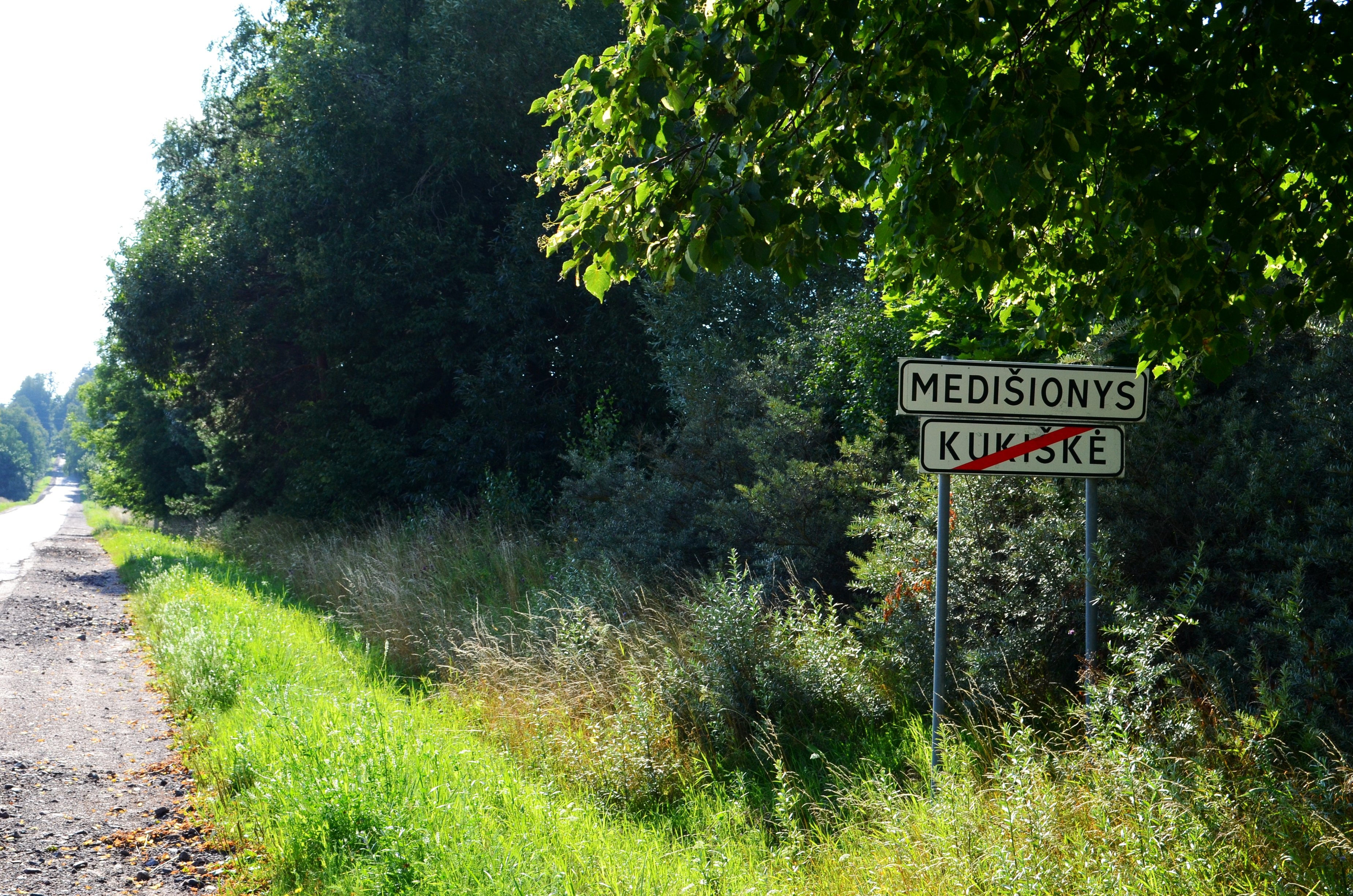 Medišionių k., Švenčionių sen., Švenčionių raj.